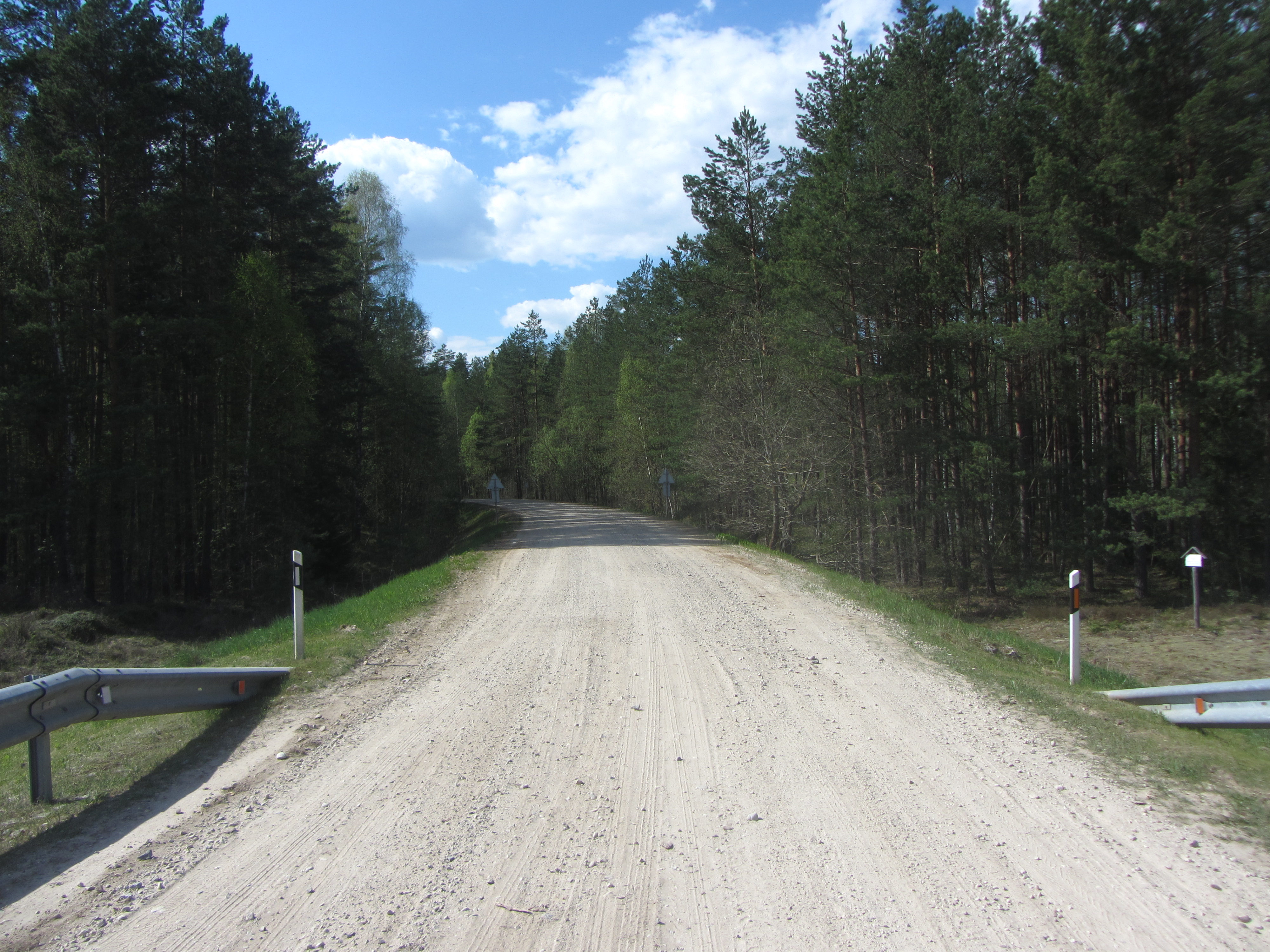 Švenčionėlių sen., Lithuania